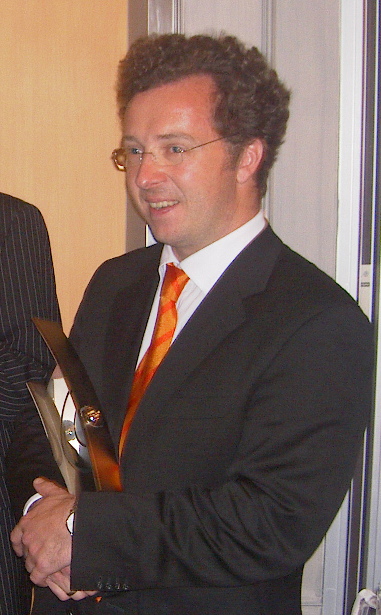 Christian Gerhaher während der Echo-Klassik-Party 2004